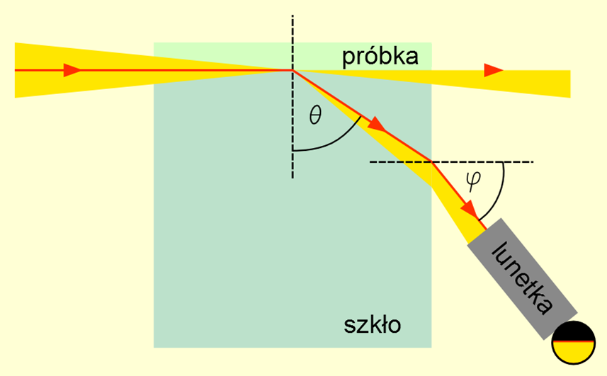 Zasada działania olfaktometru Pulfricha